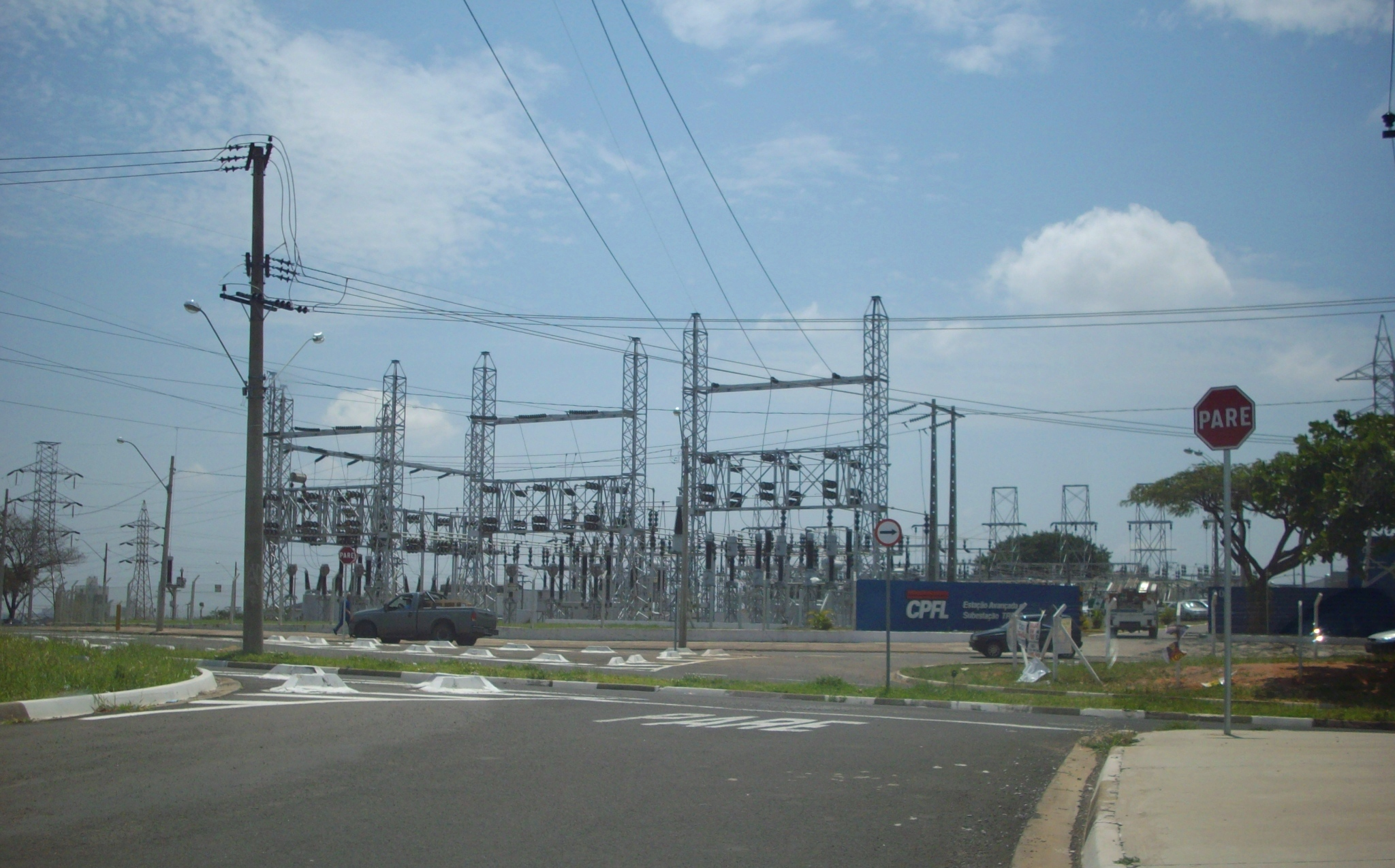 Sub estação CPFL.